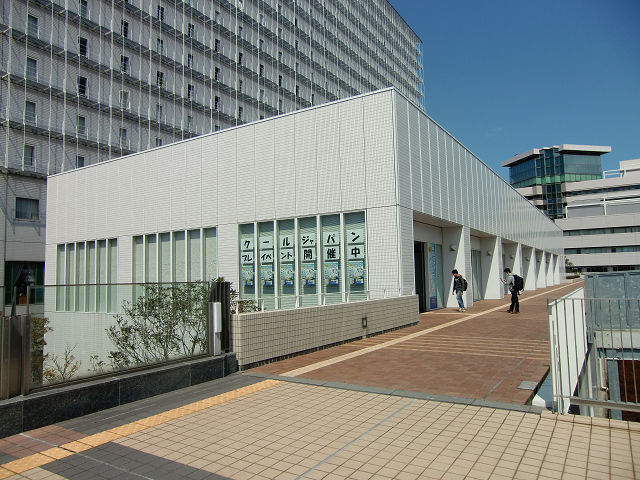 りんくう現代美術空間(2012年4月イベント開催時撮影)